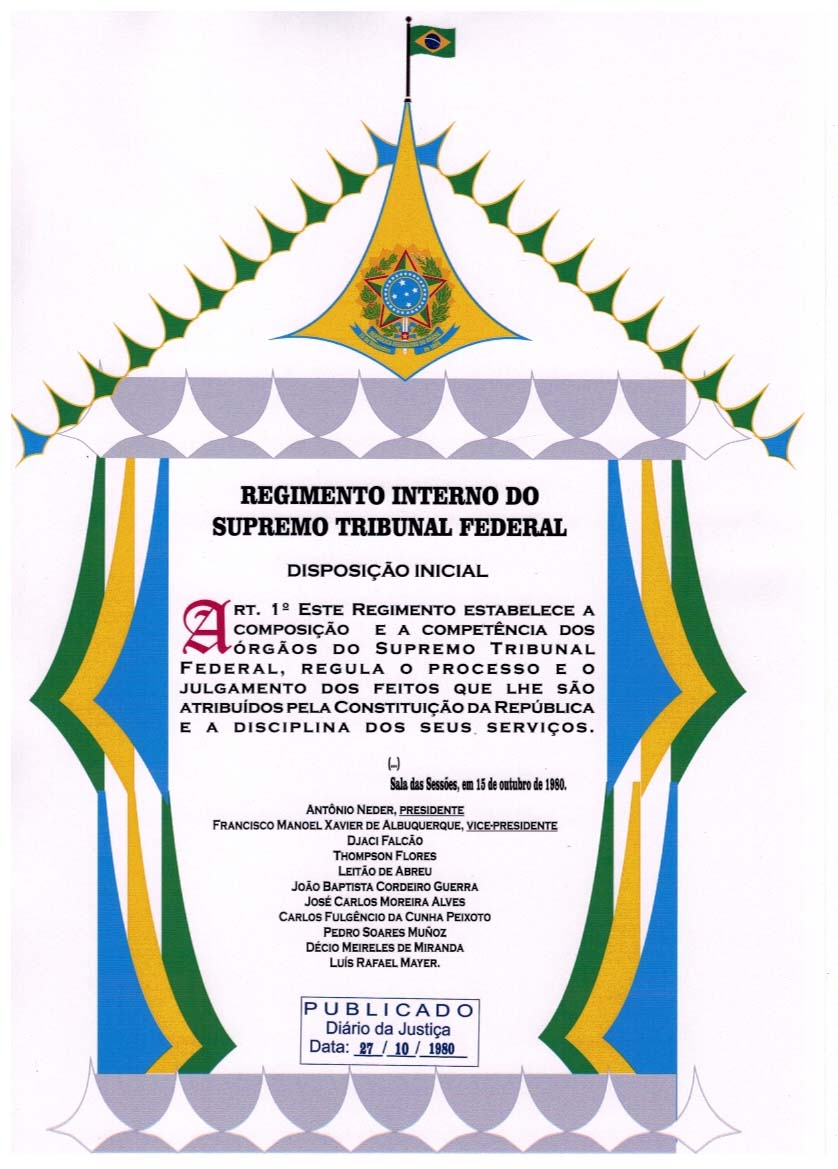 Pórtico construído com a Coluna do Brasil, inspirado nas colunas que servem de pilotis do Palácio da Alvorada.